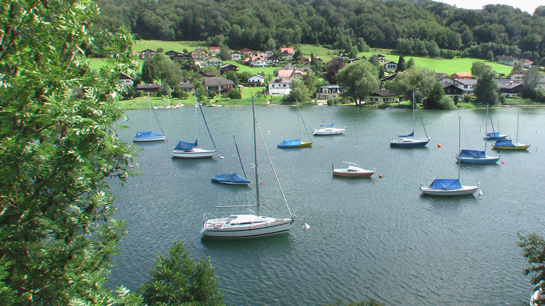 Boote auf dem Mattsee in der Weyerbucht